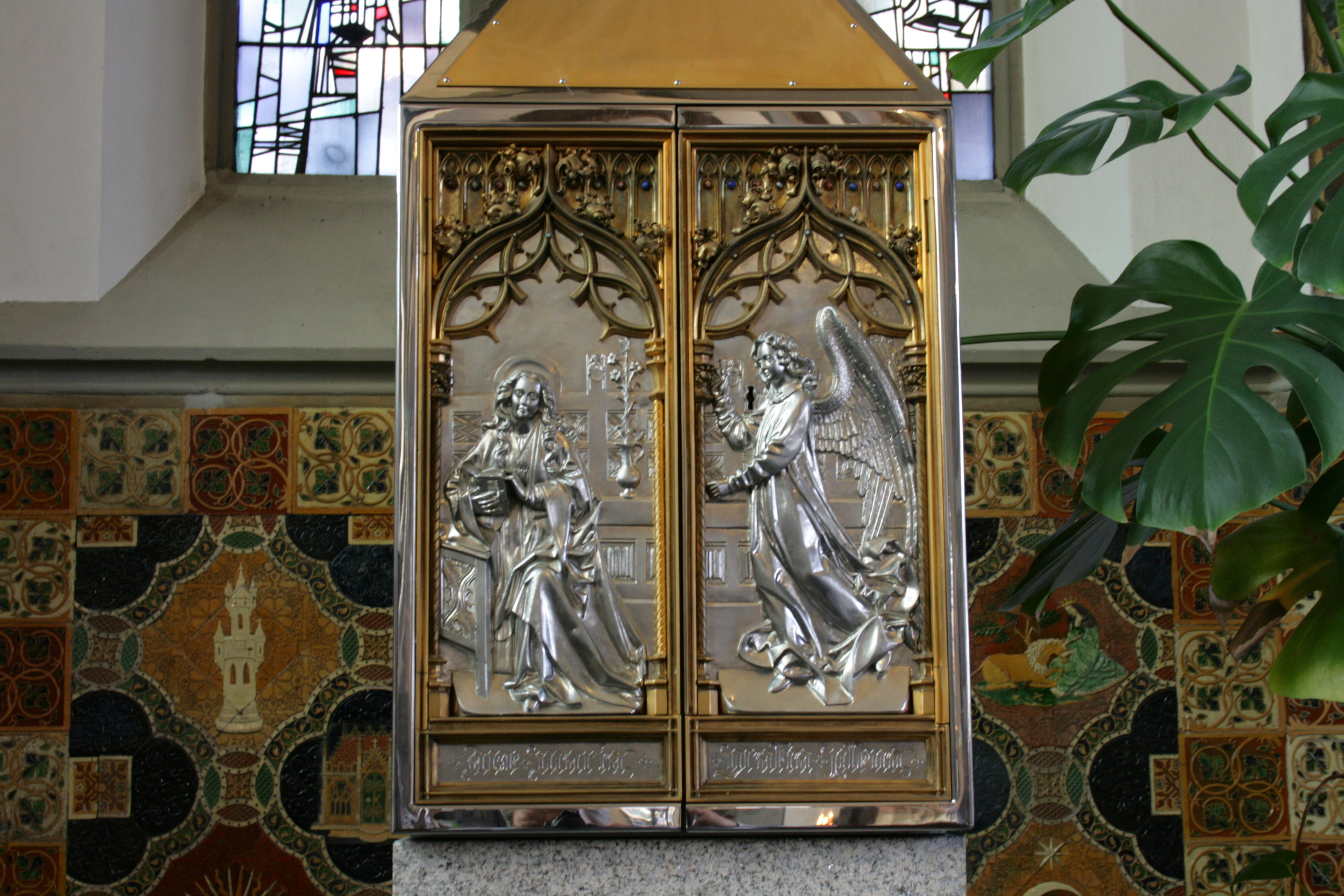 Sankt Aldegundis in Emmerich am Rhein